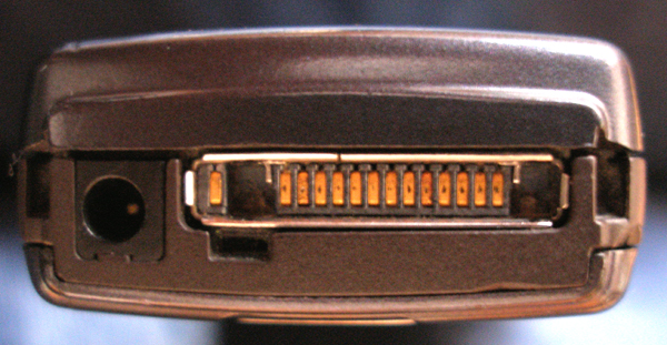 Nokia 6230 Black